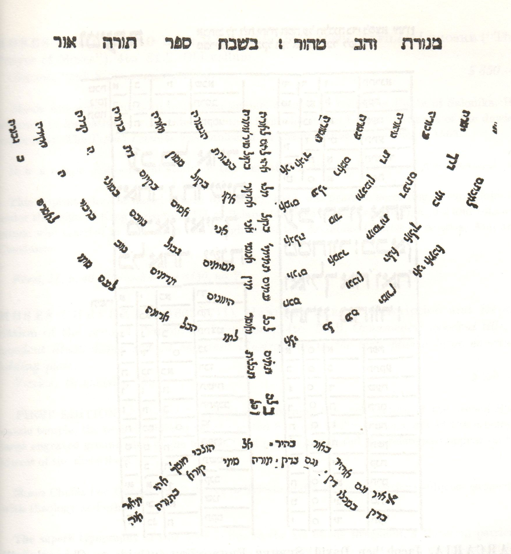 Joseph ibn Yaḥya ben David, Thorah Ow. Frontispiz mit Purim-Leuchter-Darstellung